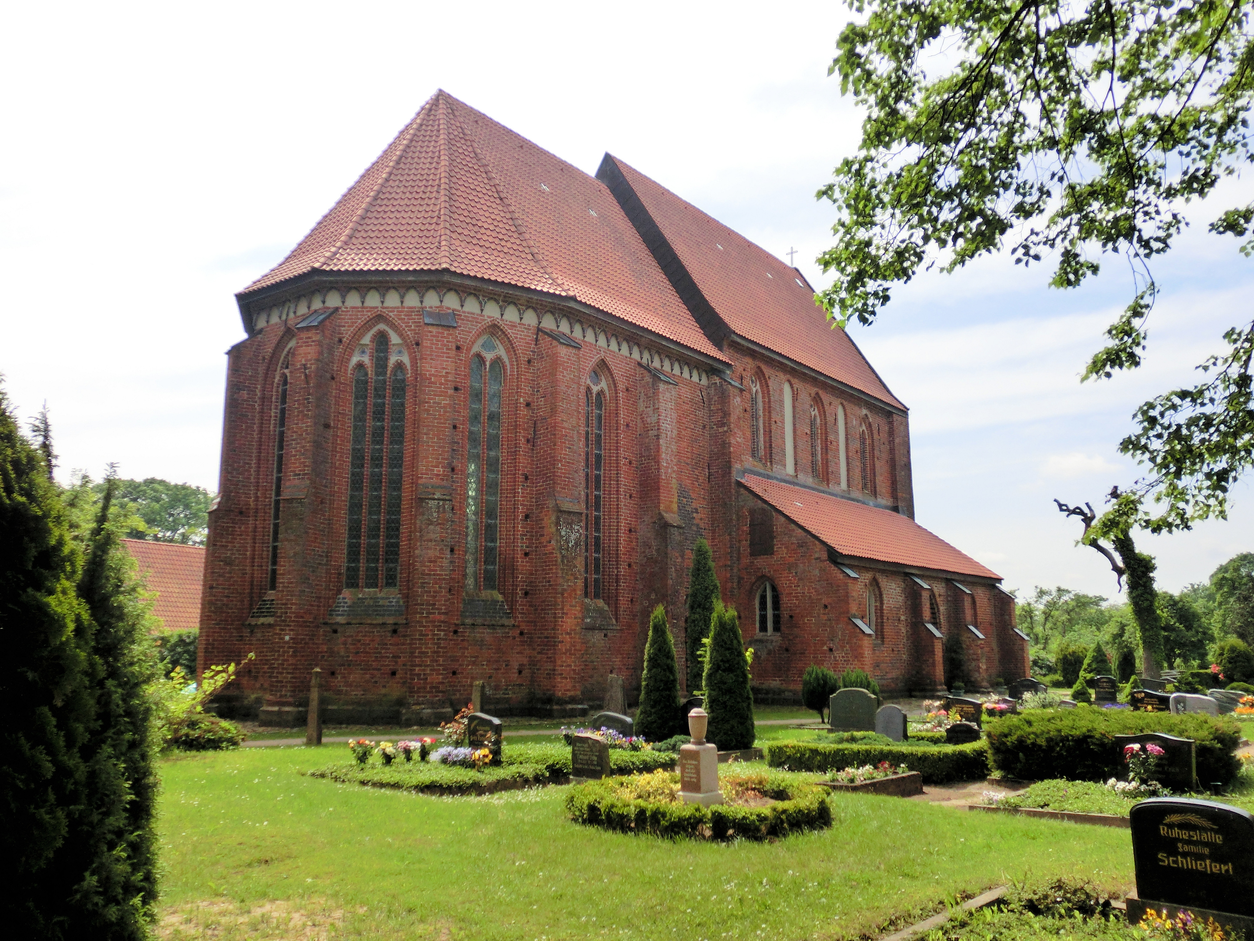 Starkow / Velgast Starkow bei Velgast St.-Jürgen-Kirche Ostsicht